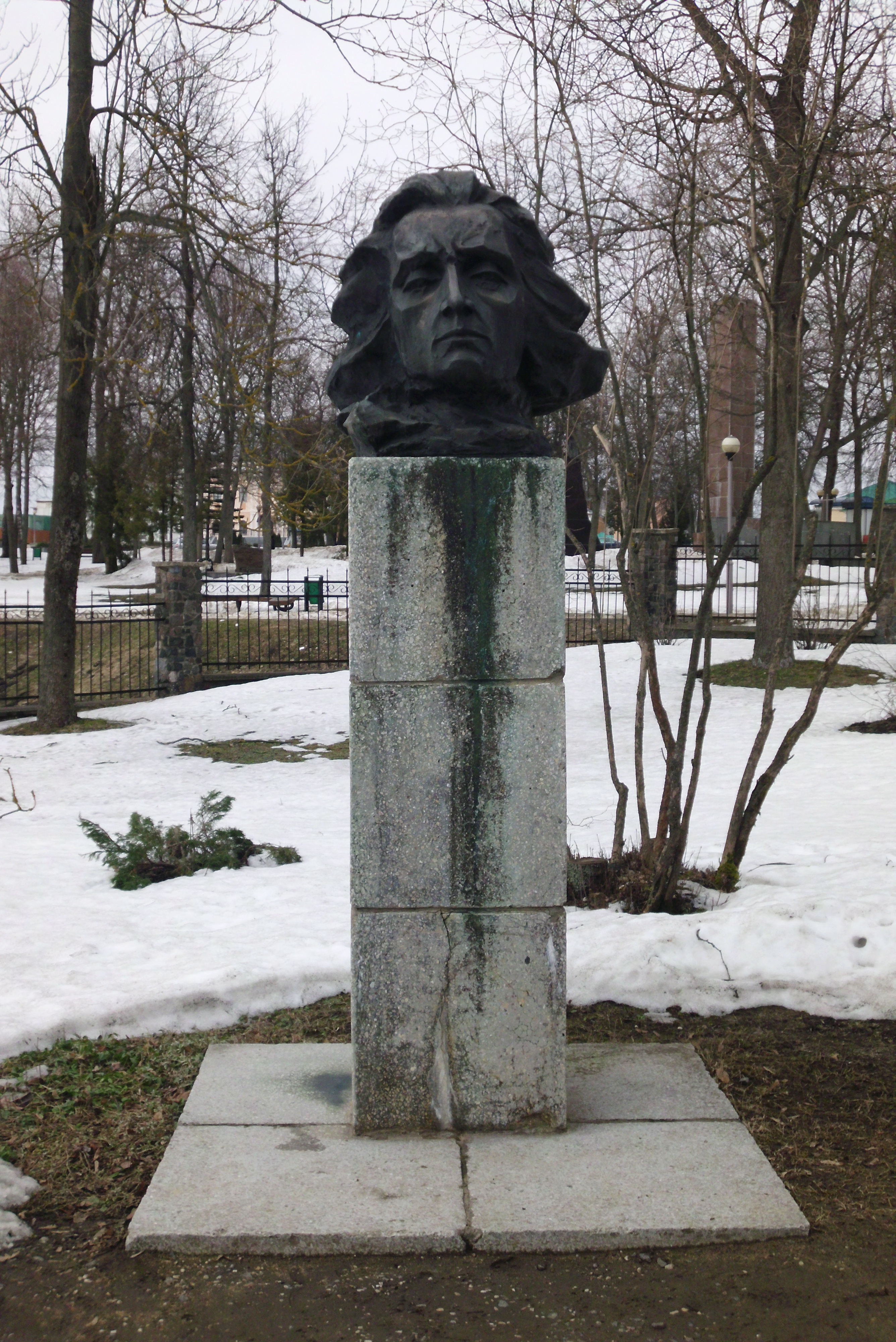 Nowogródek wiosną 2013